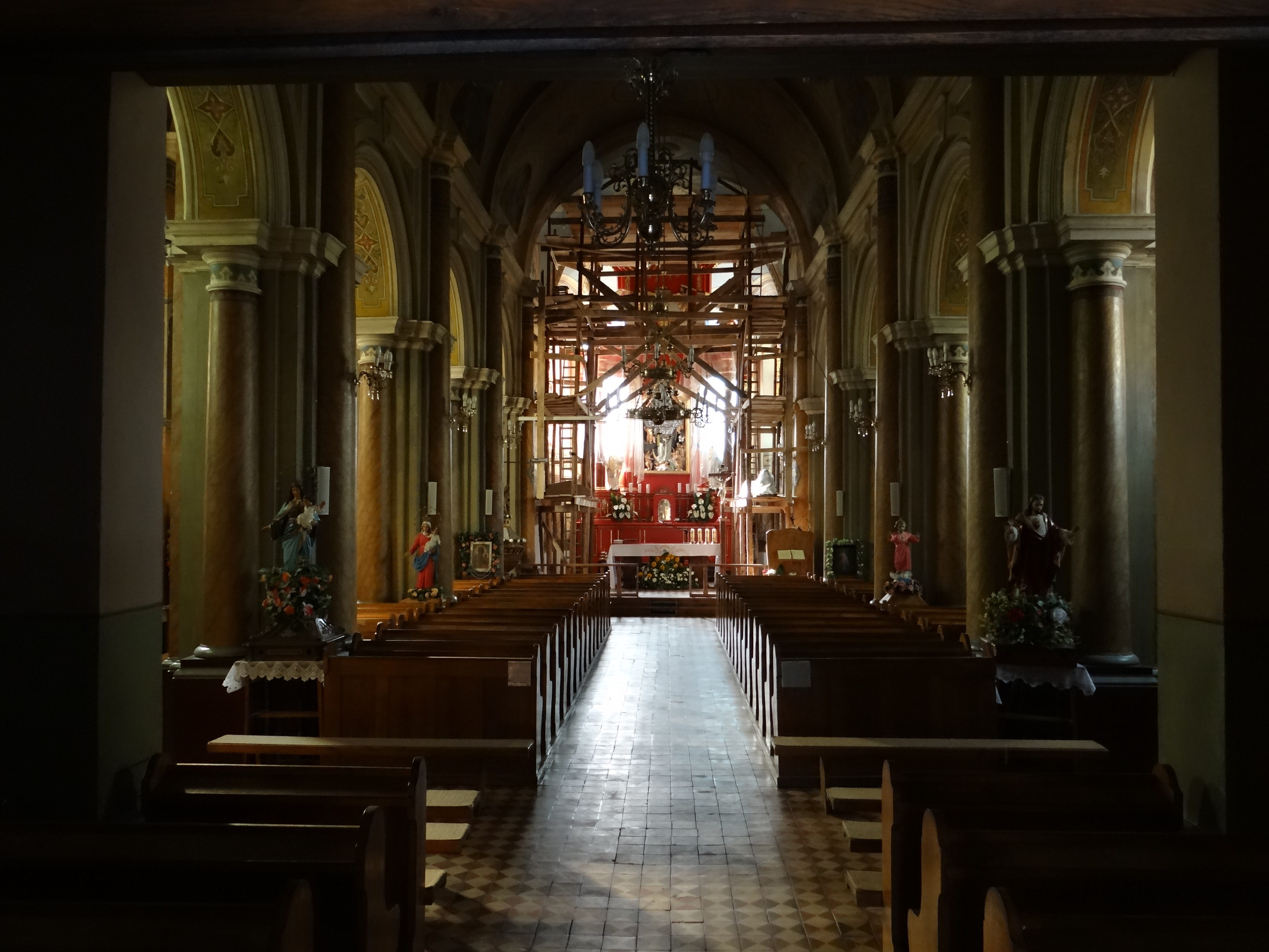 Gać, kościół par. p.w. Wniebowzięcia NMP, 1893-1894